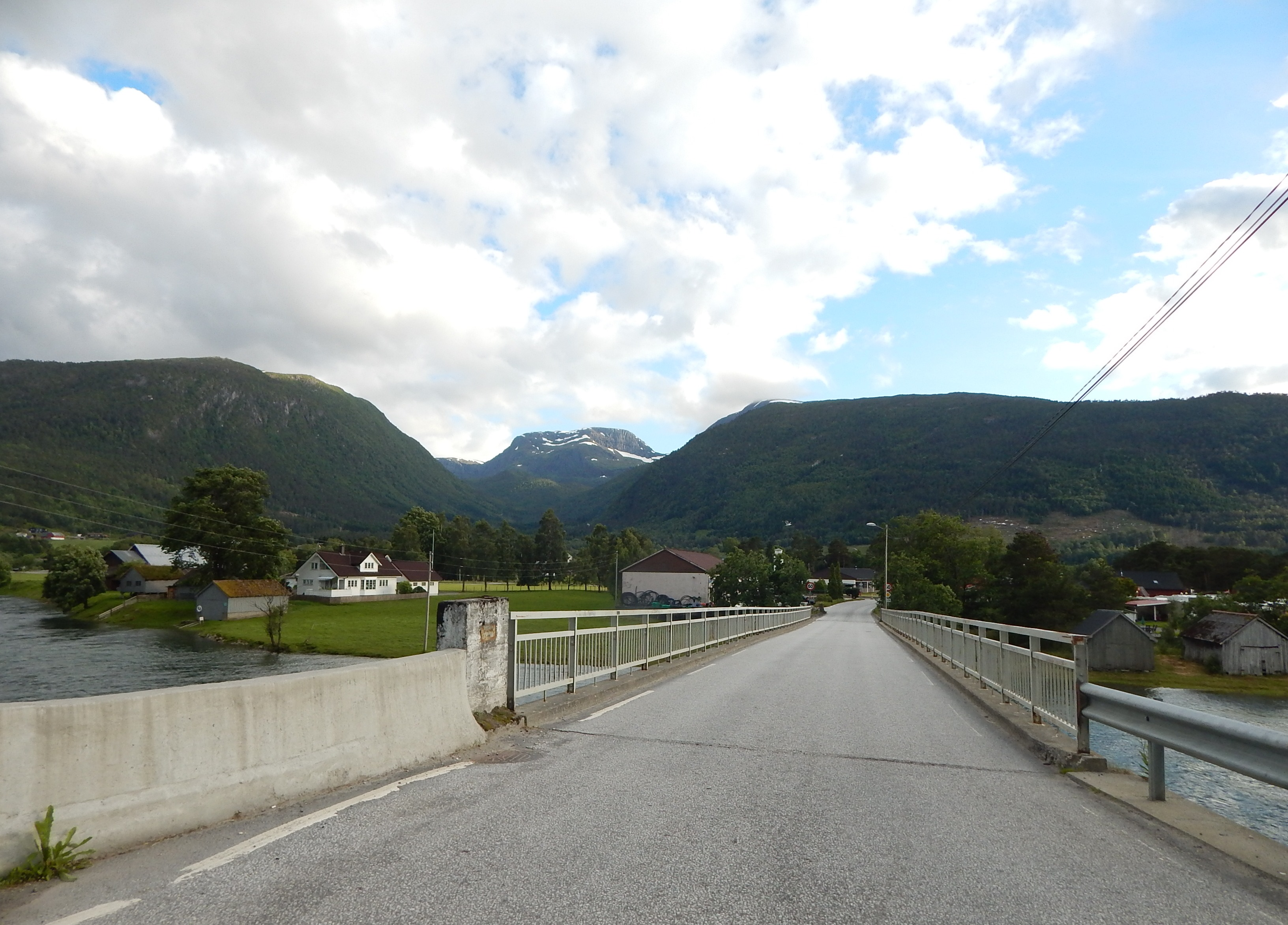 Fylkesvei 615 over Storebrua i Sandane